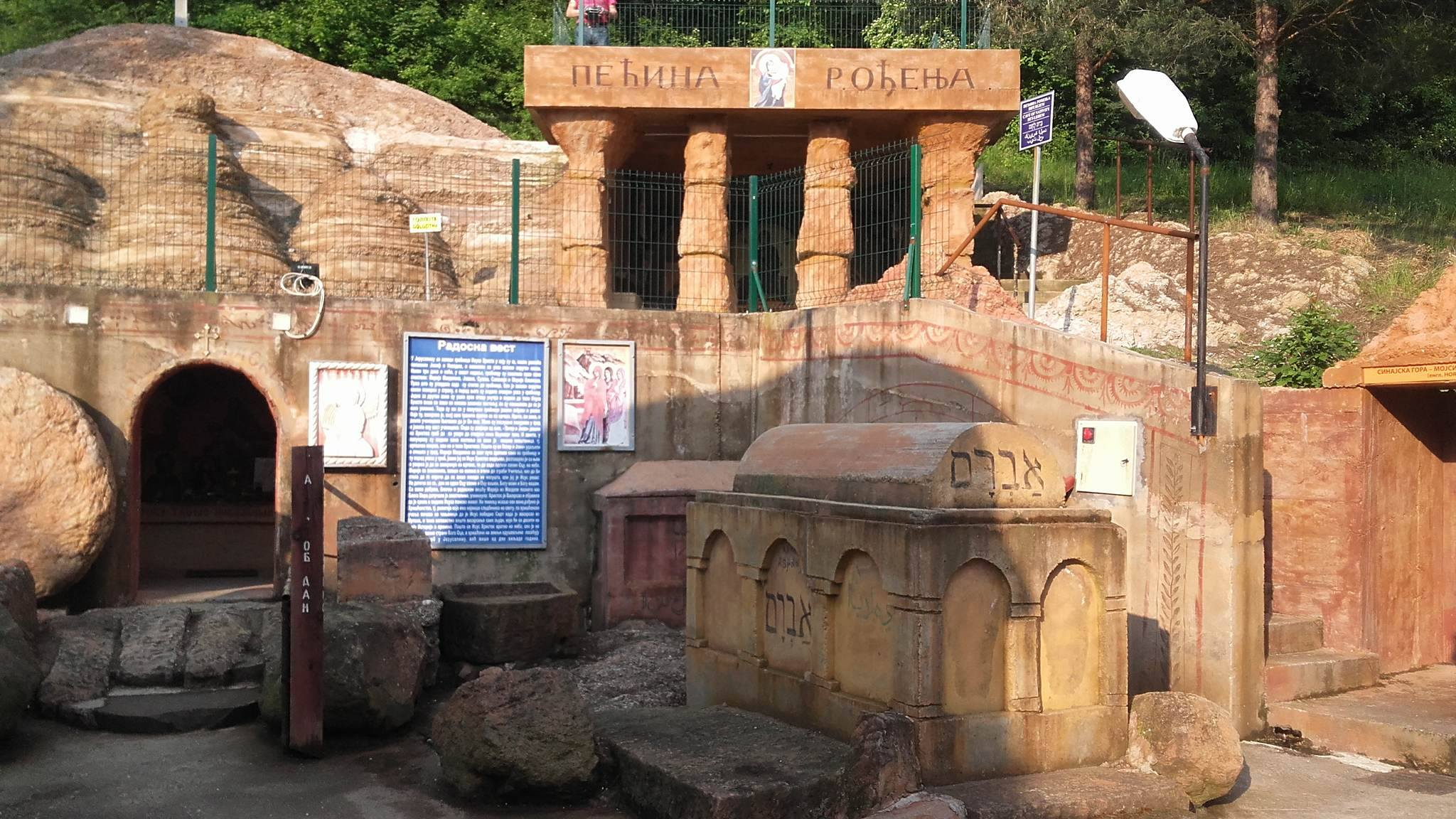 Српски (ћирилица): Манастир Свете Петке у Стублу